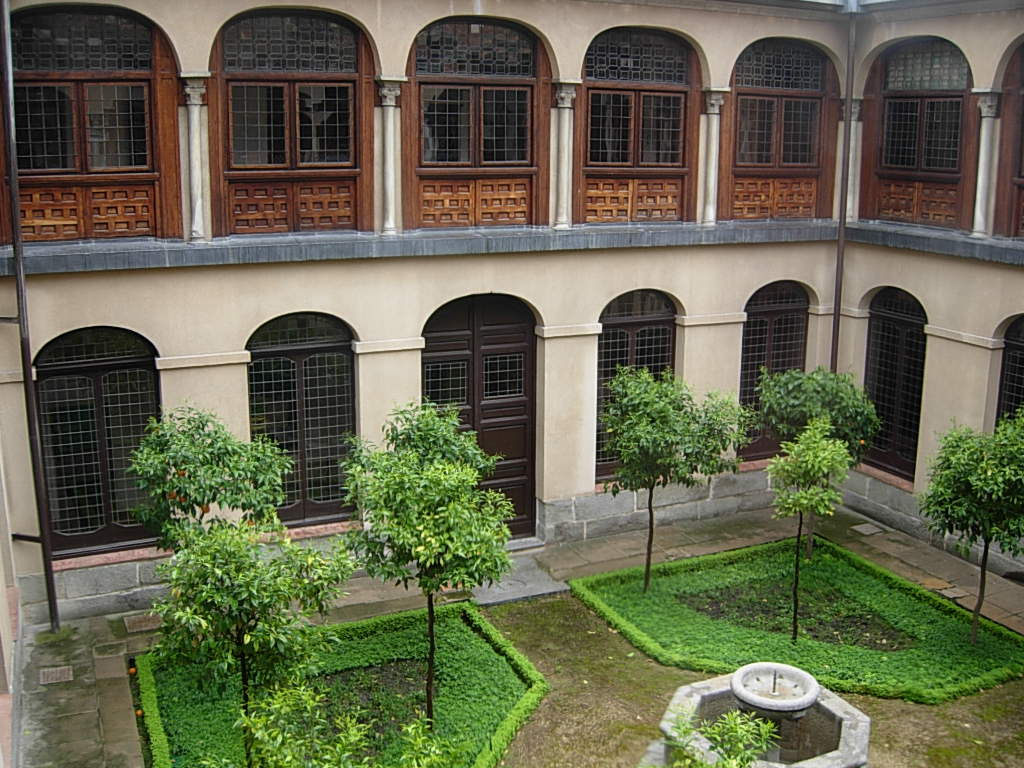 Monastero de las Descalzas Reales in Madrid Foto personale concessa in PD